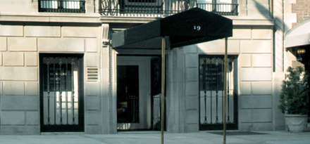 Courtesy of Blum and Poe